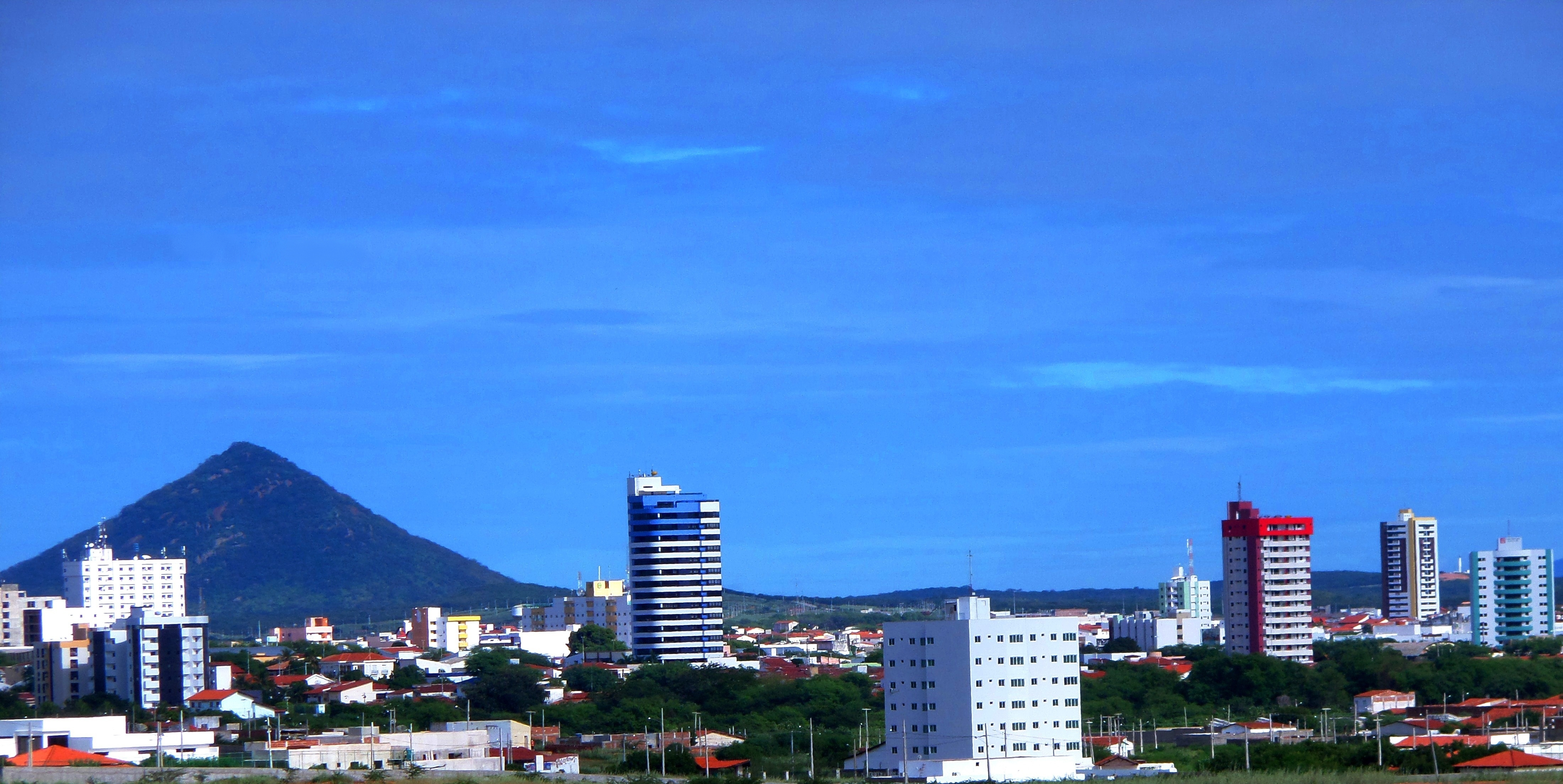 Vista Parcial de Patos/PB, a Capita do Sertão.